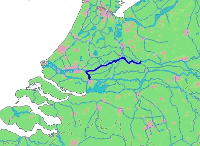 Kaart met de rivier de Lek in Nederland